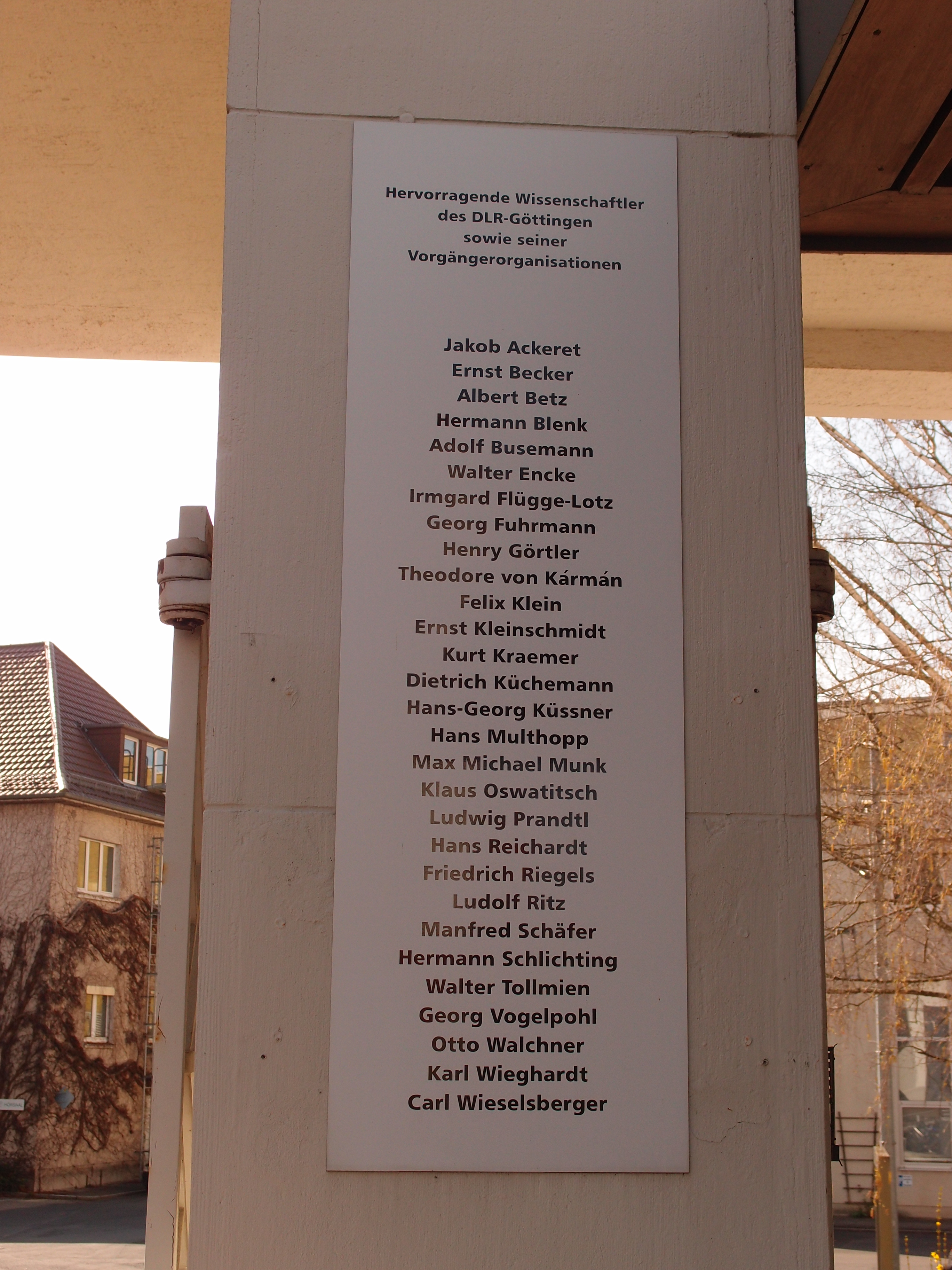 Gedenktafel für Jakob Ackeret und andere Wissenschaftler am DLR-Eingang, Göttingen, Bunsenstraße 10 Unknown memorial plaque for jakob ackeret and other scientists at the entrance of the dlr building in göttingen, bunsenstrasse 10.